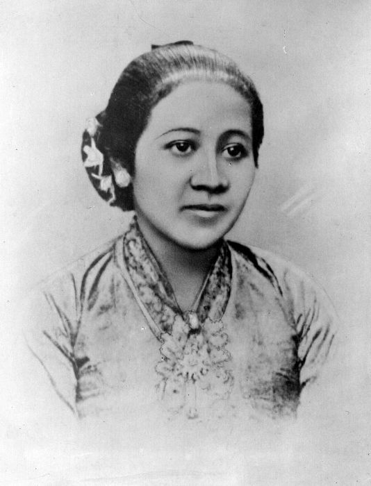 Repro Negatif. Potret Raden Adjeng Kartini.